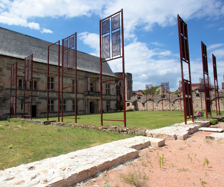 Innenhof des Schlosses Assier